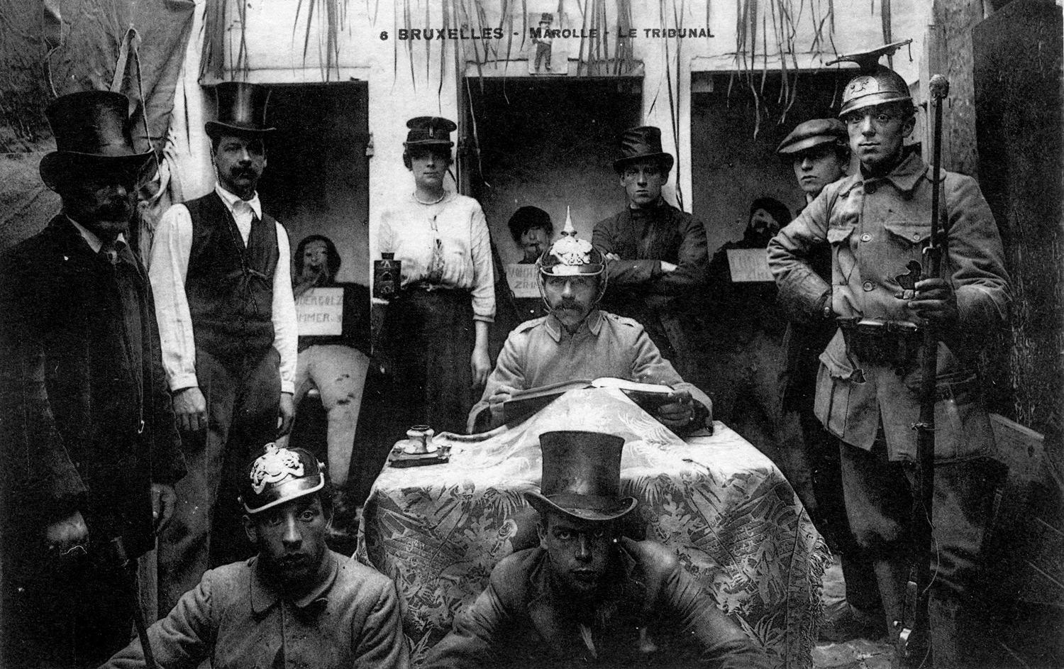 Verkleedpartij in de Marollen ter gelegenheid van de overwinningsmars